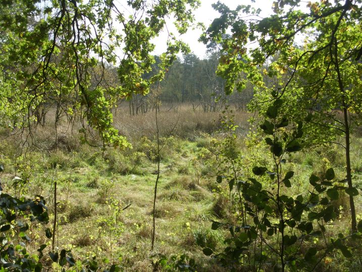 Naturschutzgebiet „Hemelsmoor“